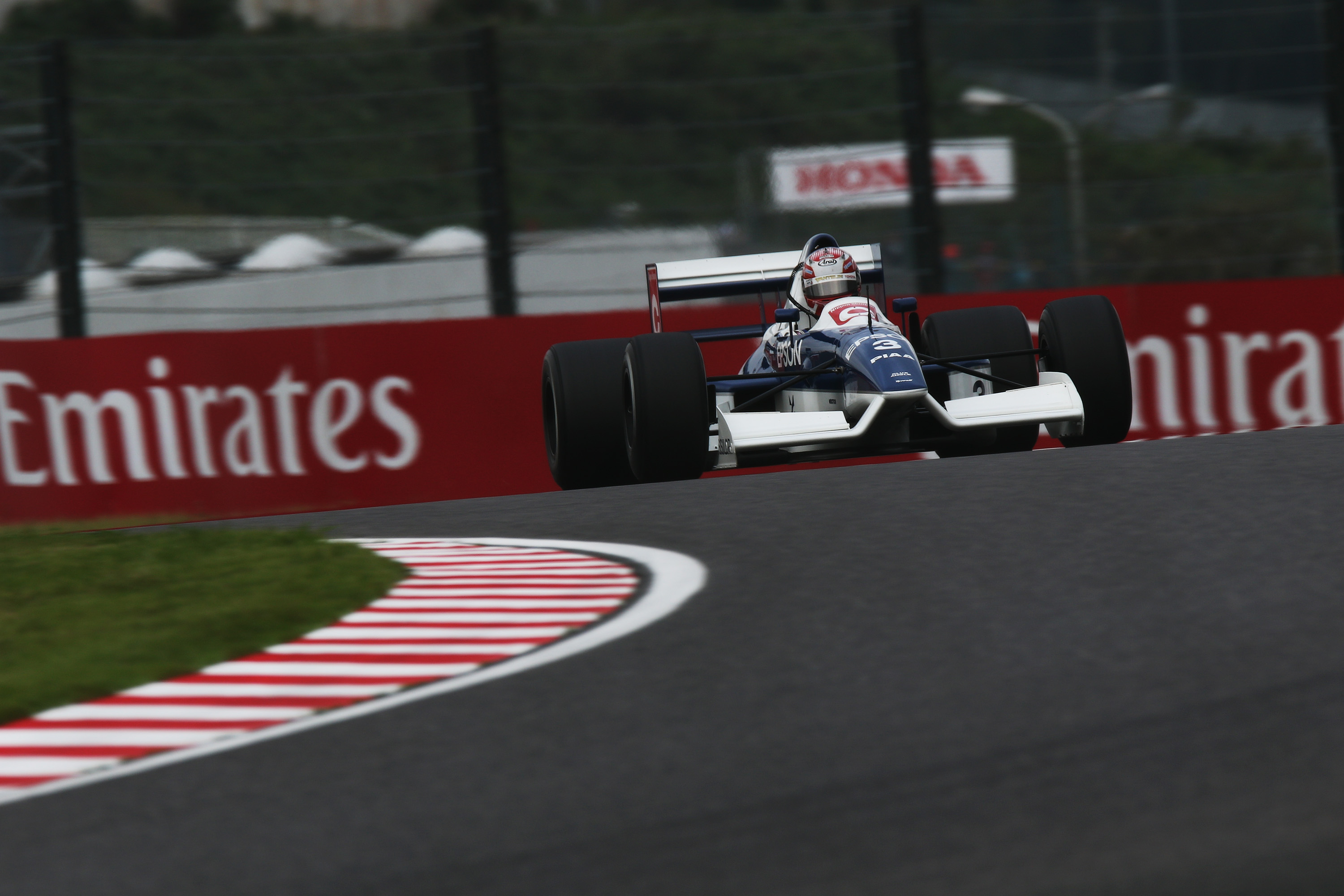 Satoru Nakajima Tyrrell 019 2018 Japanese Grand Prix.